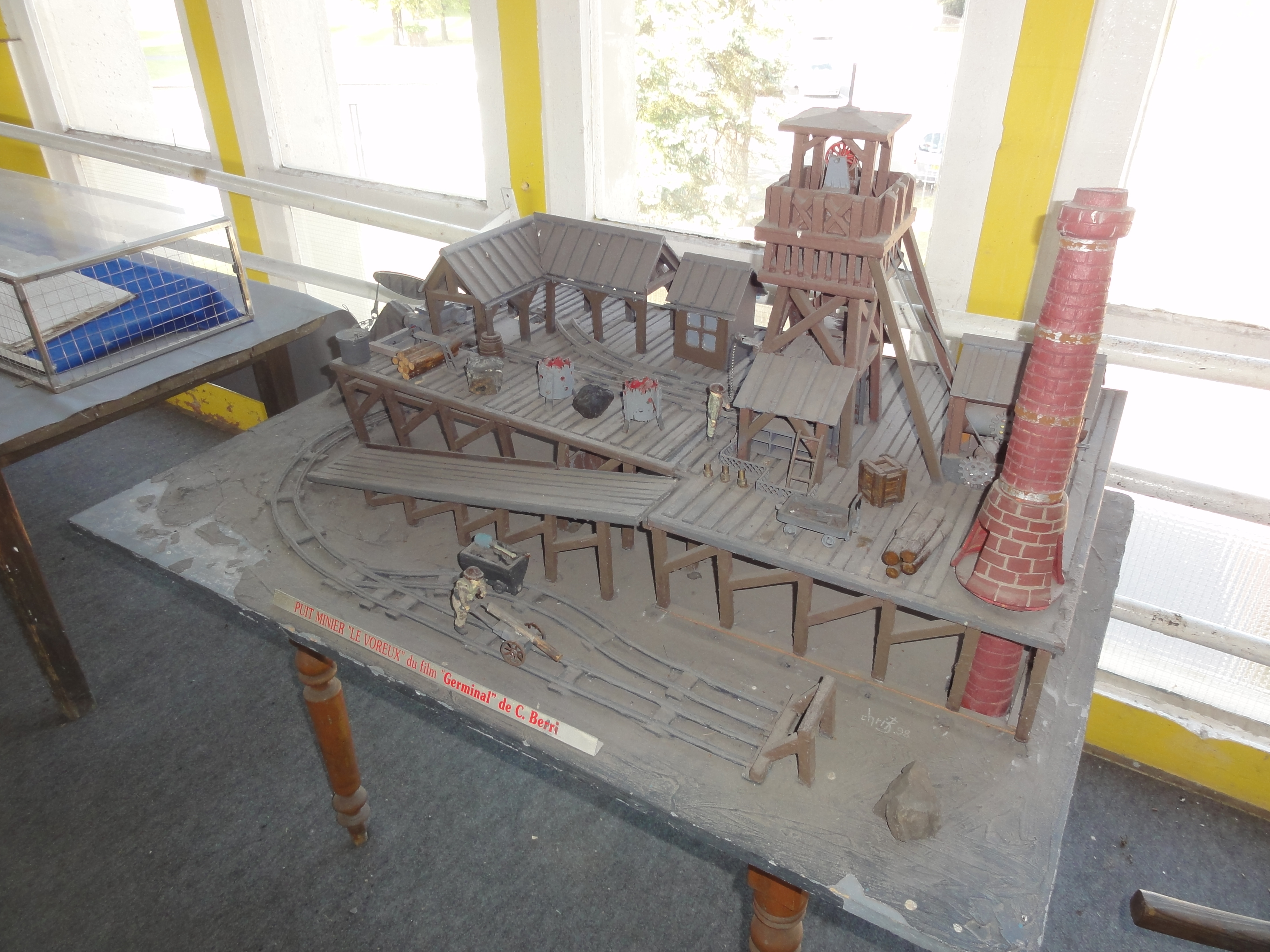 Ce document a été réalisé avec l’aimable autorisation de la Communauté d'agglomération de la Porte du Hainaut. English | français | +/−